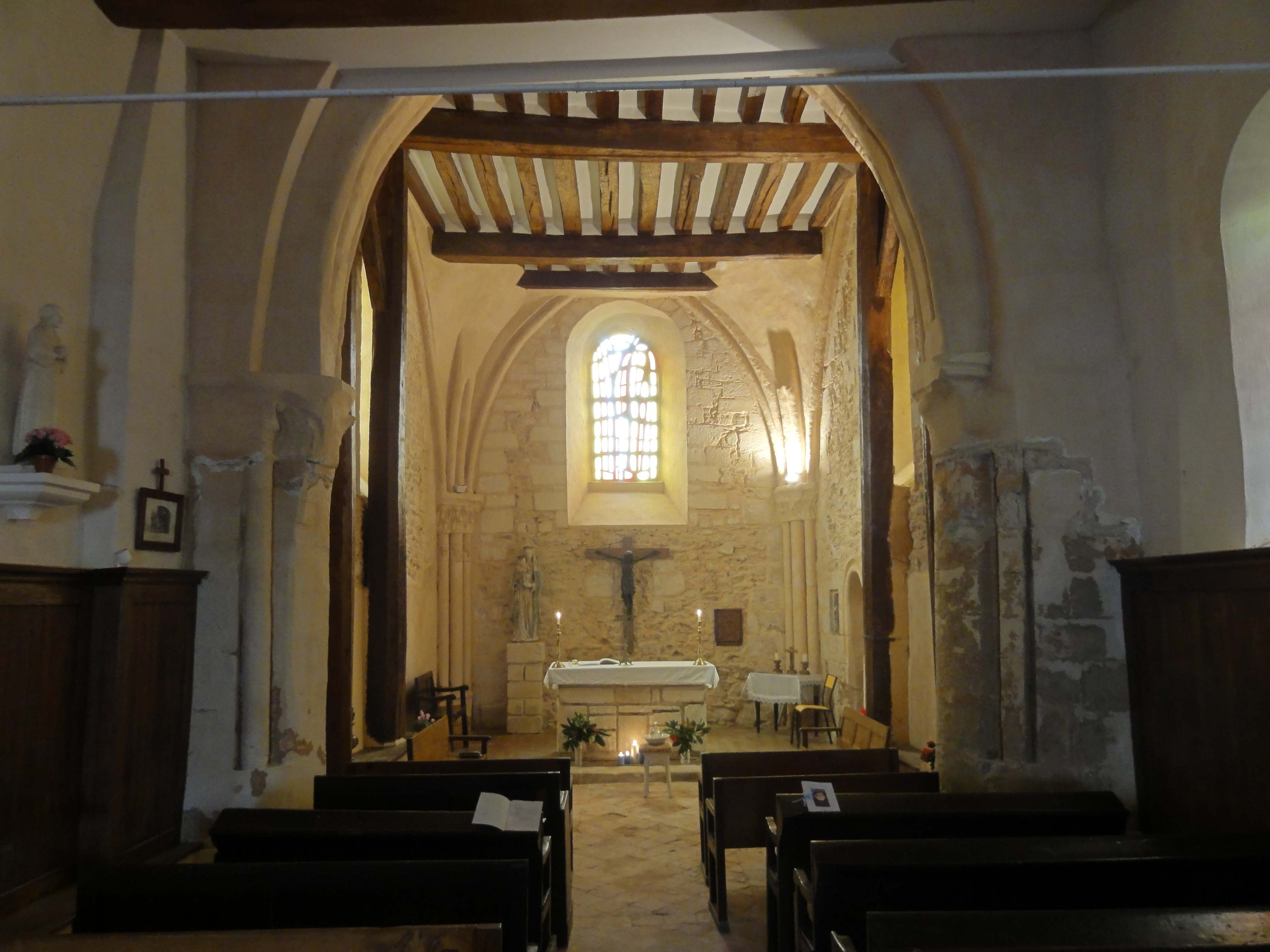 Intérieur de l'église - voir titre.